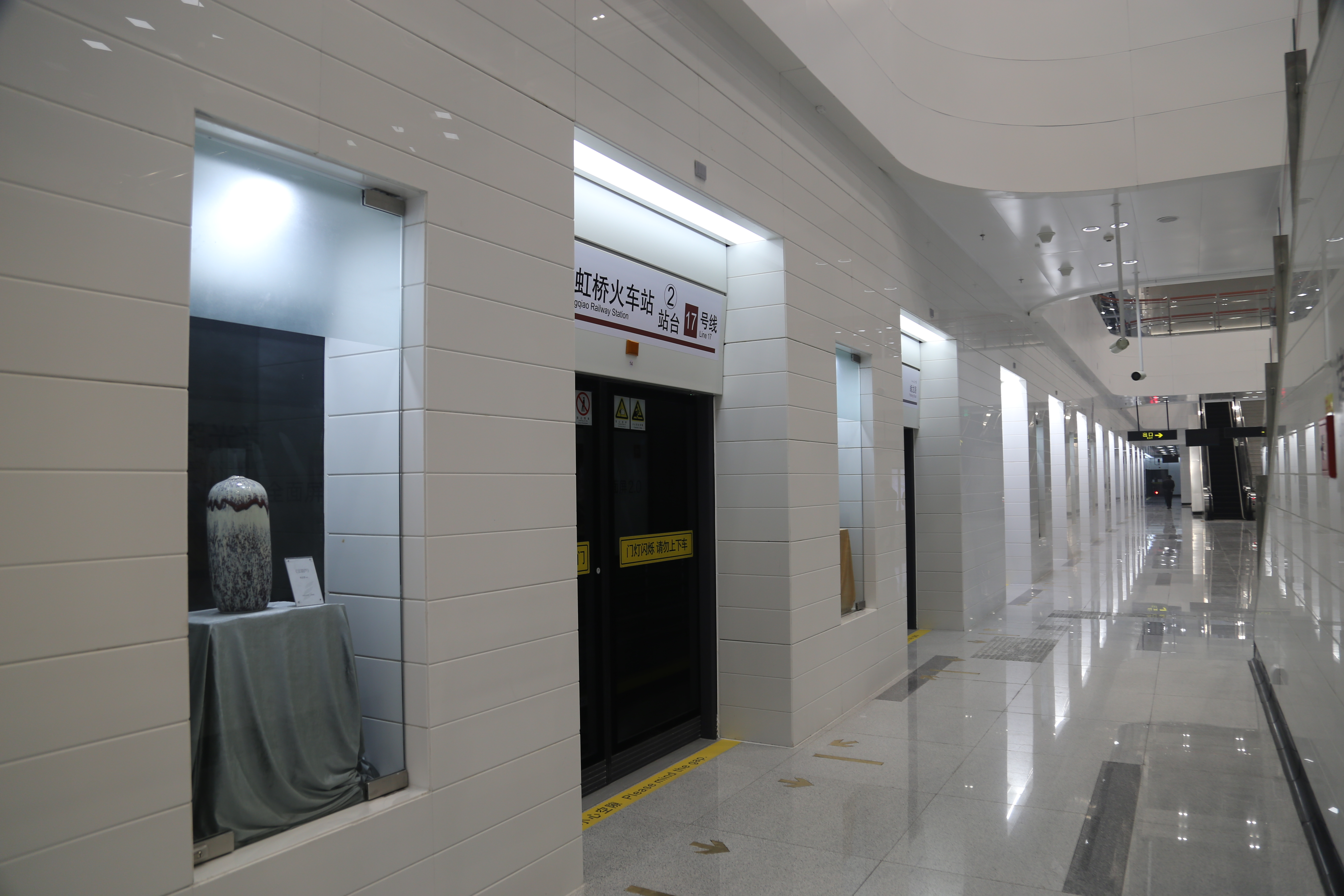 诸光路站屏蔽门之间设置有申窑艺术品